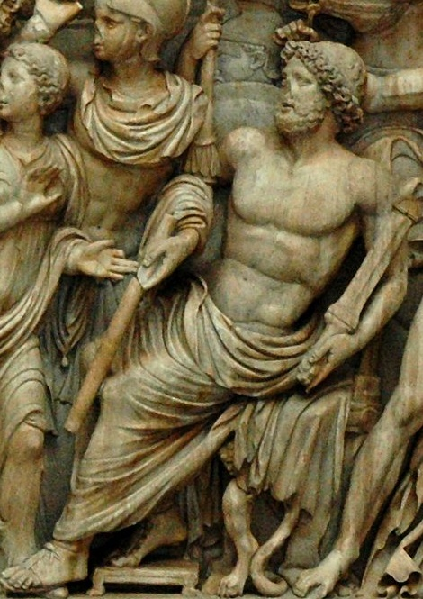 Sarcofago con la storia di Achille a Sciro, dettaglio con la figura di Agamennone